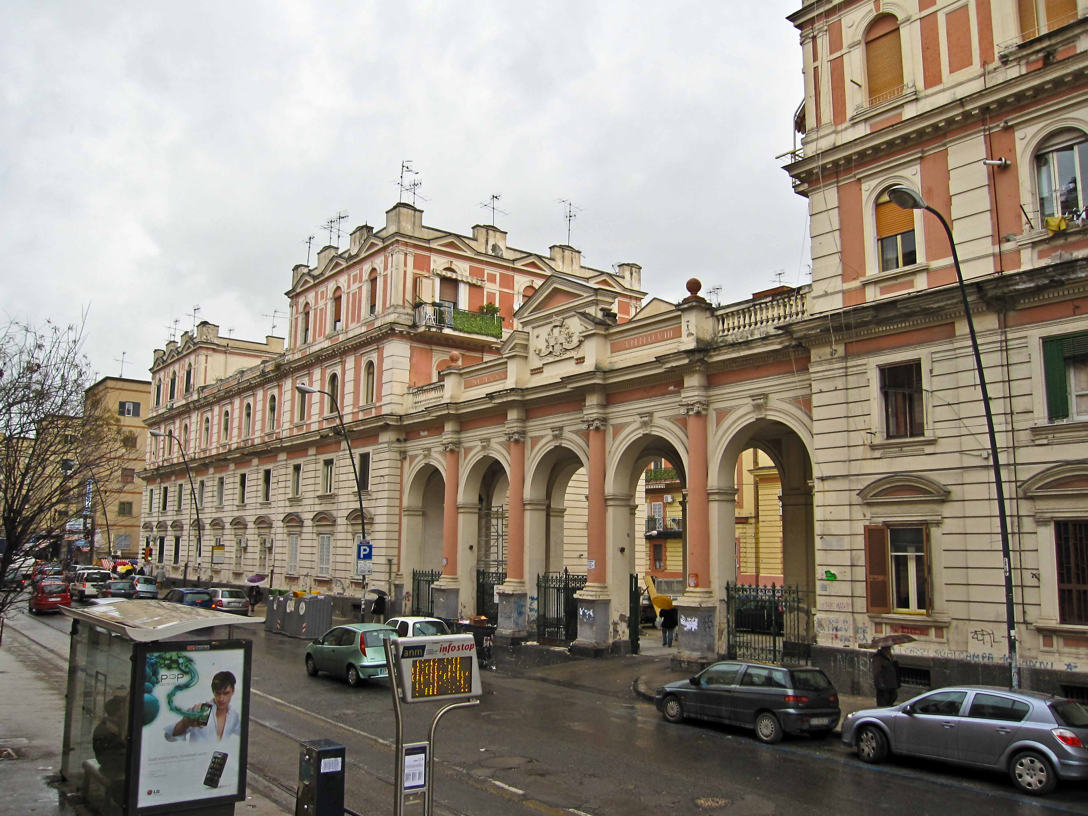 Via Leopardi (Napoli) Edificio civile realizzato intorno al 1913 da Domenico Primicerio, progettista della stessa strada